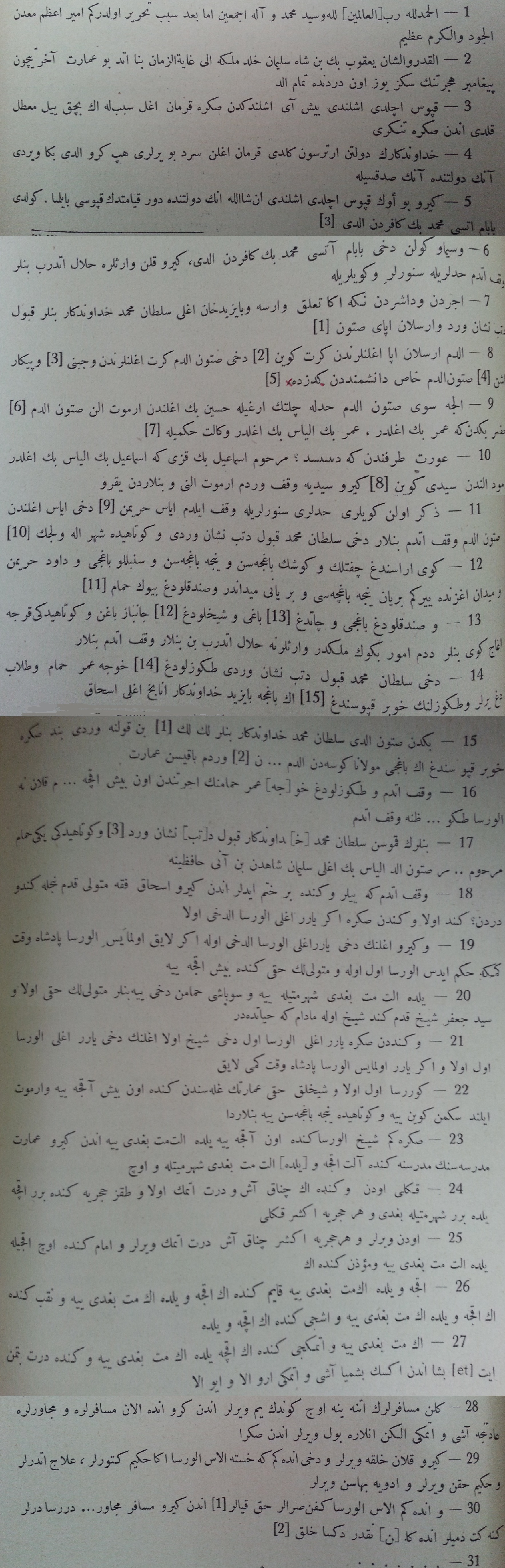 Balıklı Camisi, Kütahya.